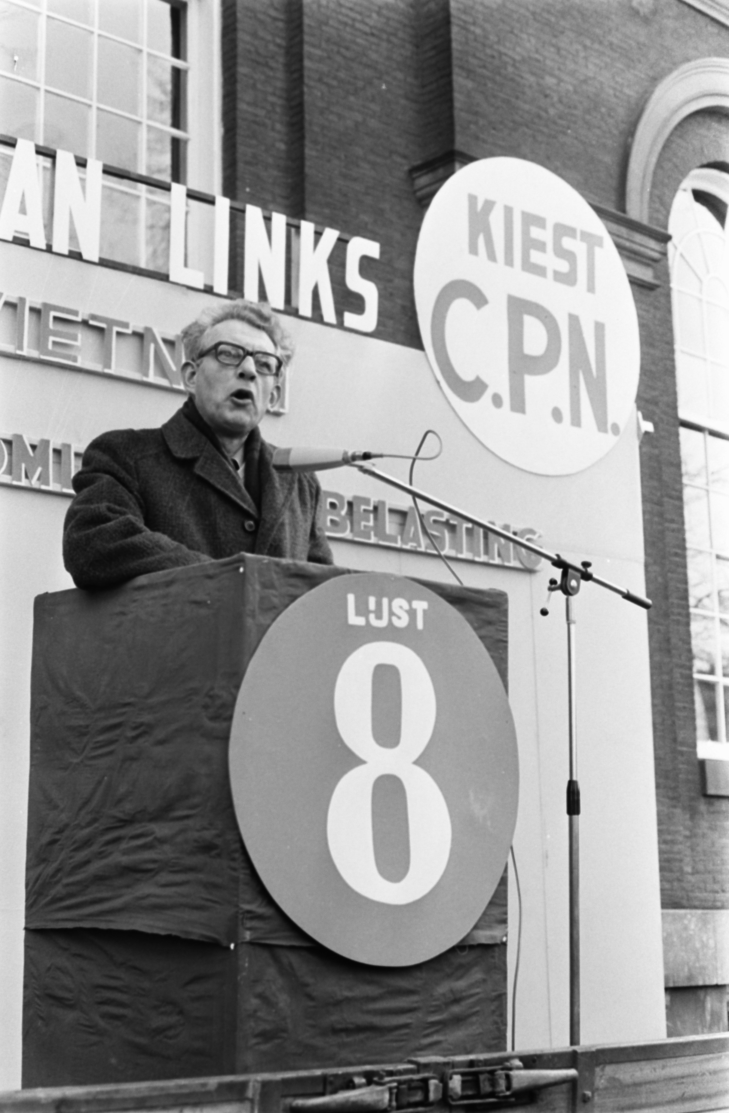 Collectie / Archief : Fotocollectie Anefo Reportage / Serie : [ onbekend ] Beschrijving : Verkiezingsbijeenkomst van de CPN op het Spui in Amsterdam; fractievoorzitter van de CPN Marcus Bakker aan het woord Datum : 14 maart 1970 Locatie : Amsterdam, Noord-Holland Trefwoorden : parlementariërs, verkiezingen, verkiezingscampagnes Persoonsnaam : Bakker, Marcus Fotograaf : Evers, Joost / Anefo Auteursrechthebbende : Nationaal Archief Materiaalsoort : Negatief (zwart/wit) Nummer archiefinventaris : bekijk toegang 2.24.01.05 Bestanddeelnummer : 923-3467